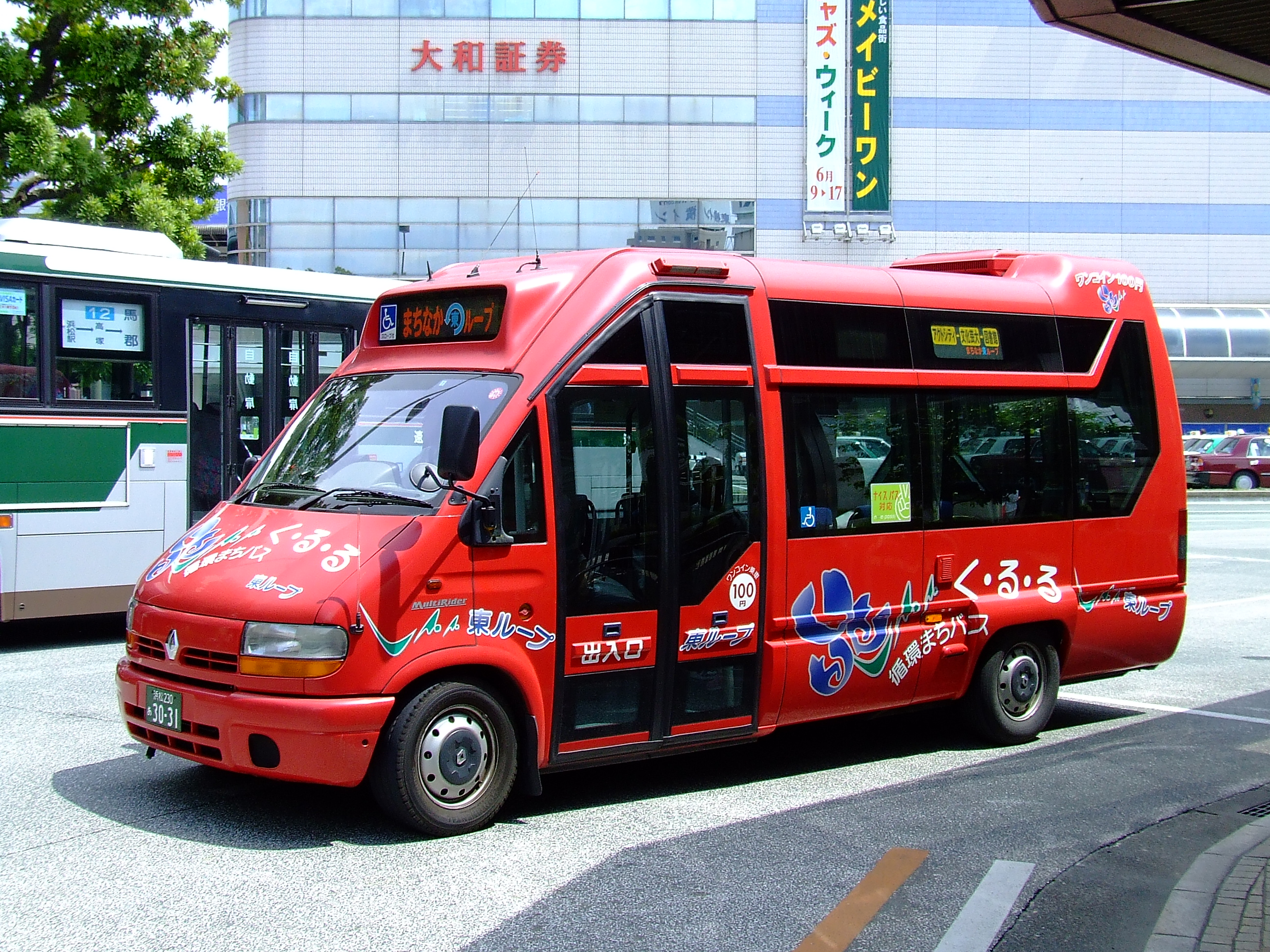 遠鉄バスの循環まちバス「く・る・る」 浜松駅バスターミナルにて